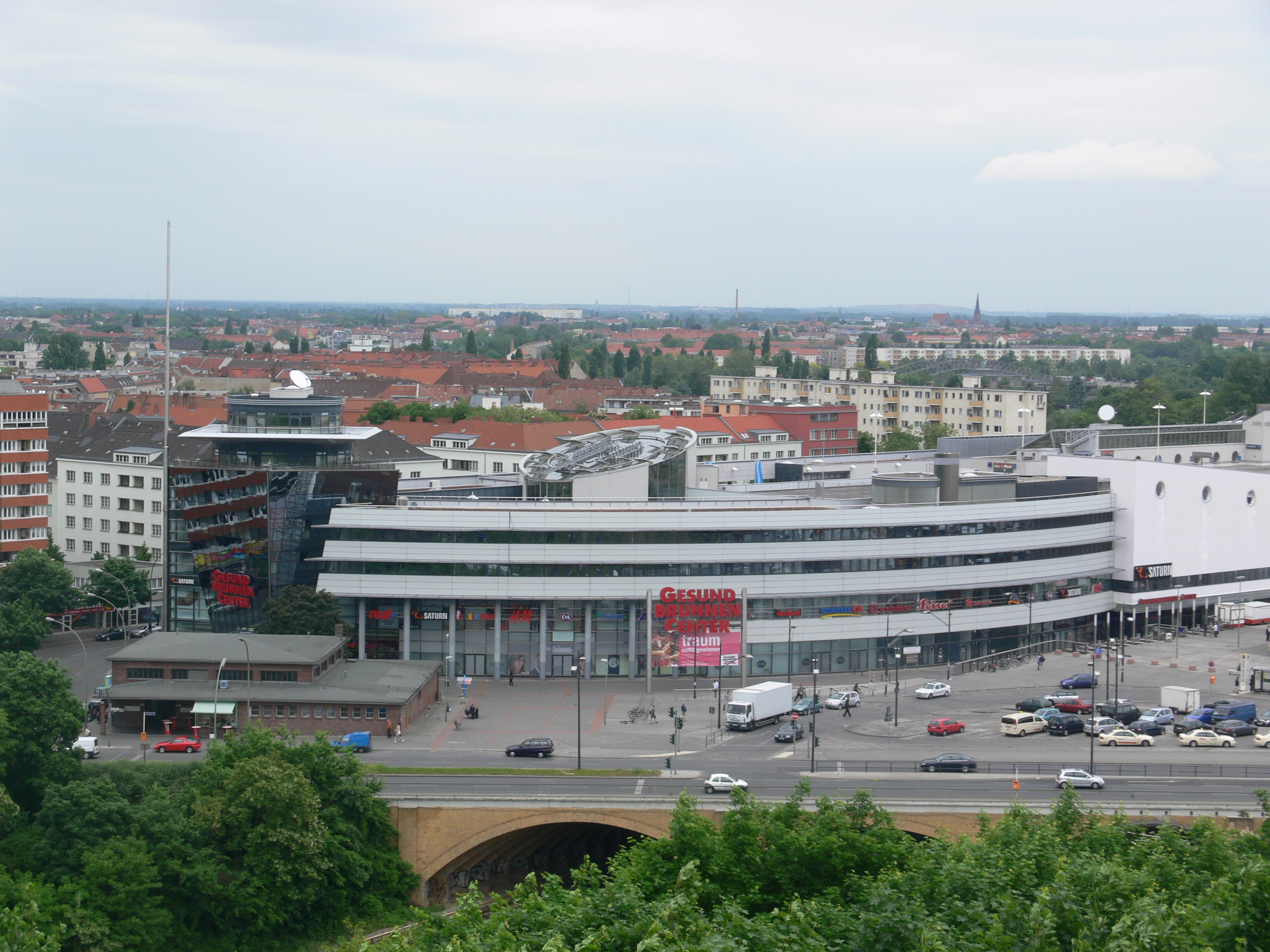 Gesundbrunnen-Center, gesehen von der Humboldthöhe